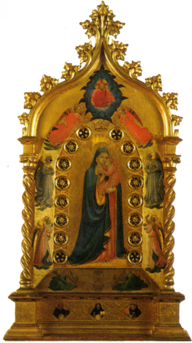 Angelico, madonna della stella, 60x30 cm